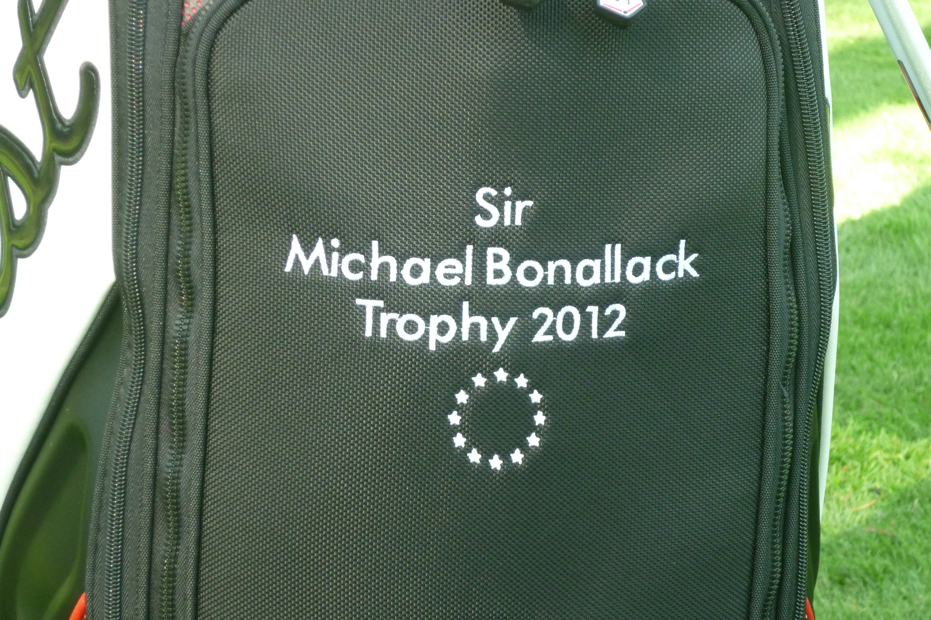 golftas met Bonallack Trophy logo